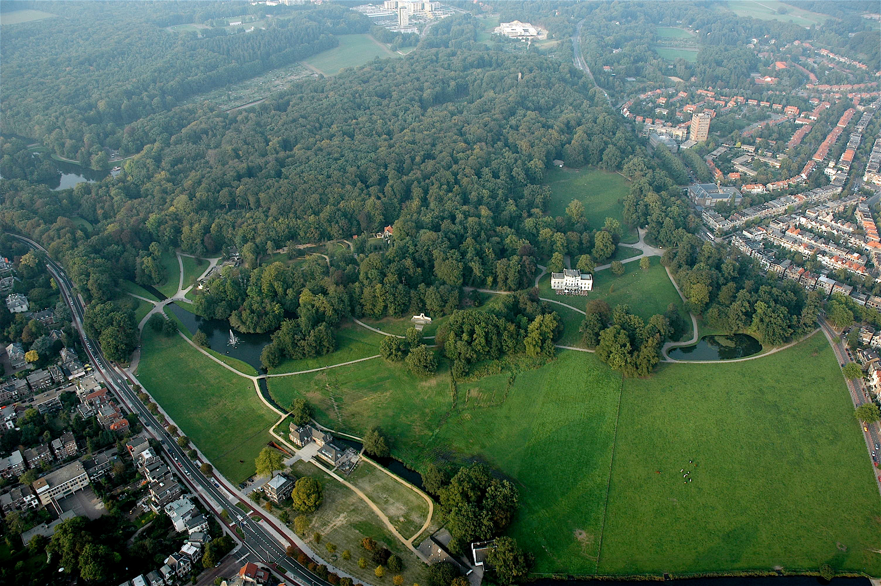 Luchtfoto van Park Sonsbeek in Arnhem, vanaf het zuiden gezien.